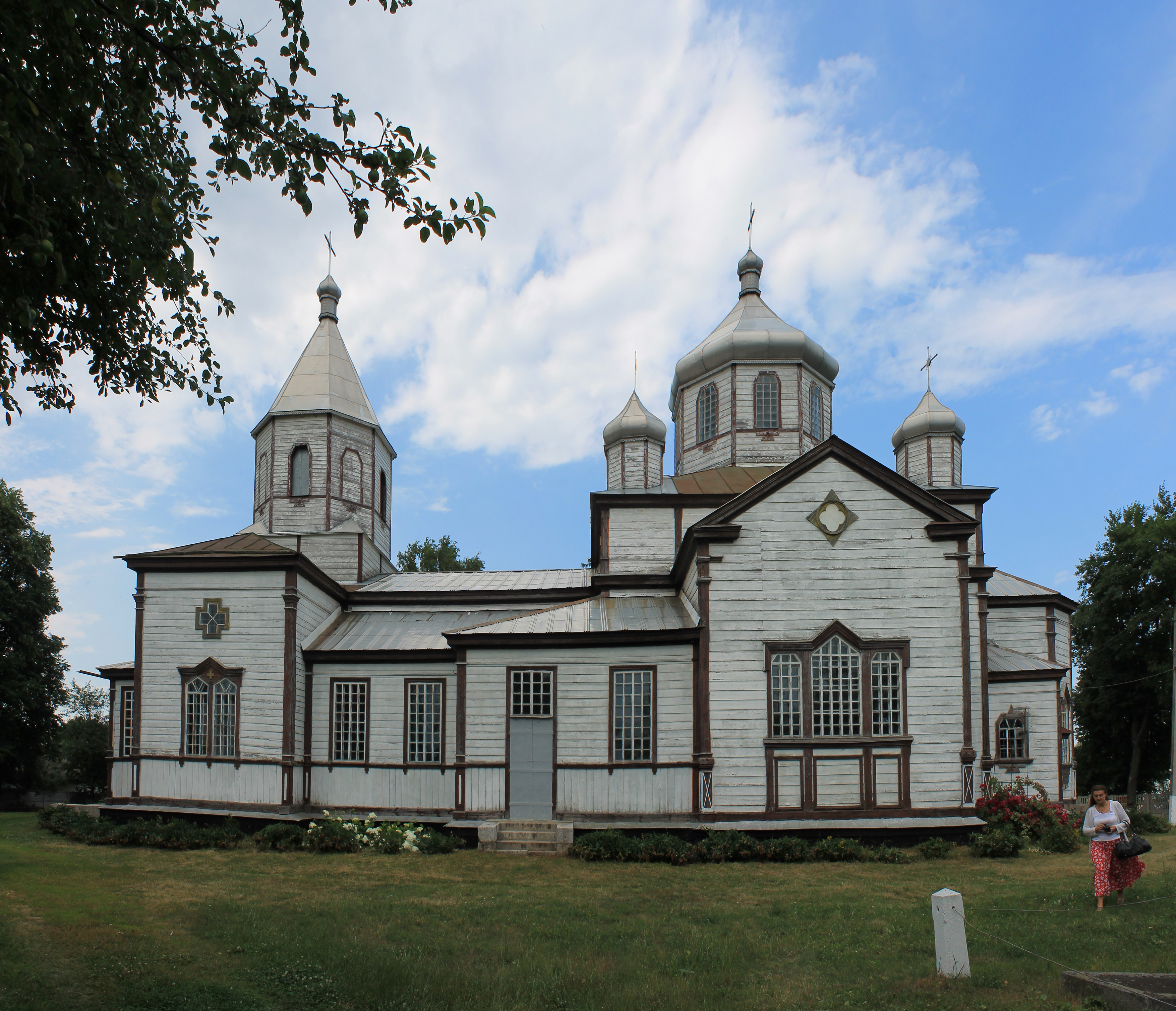 Церква Архістратига Михаїла, с.Михайлівка, Кам'янський район, Черкаська обл.